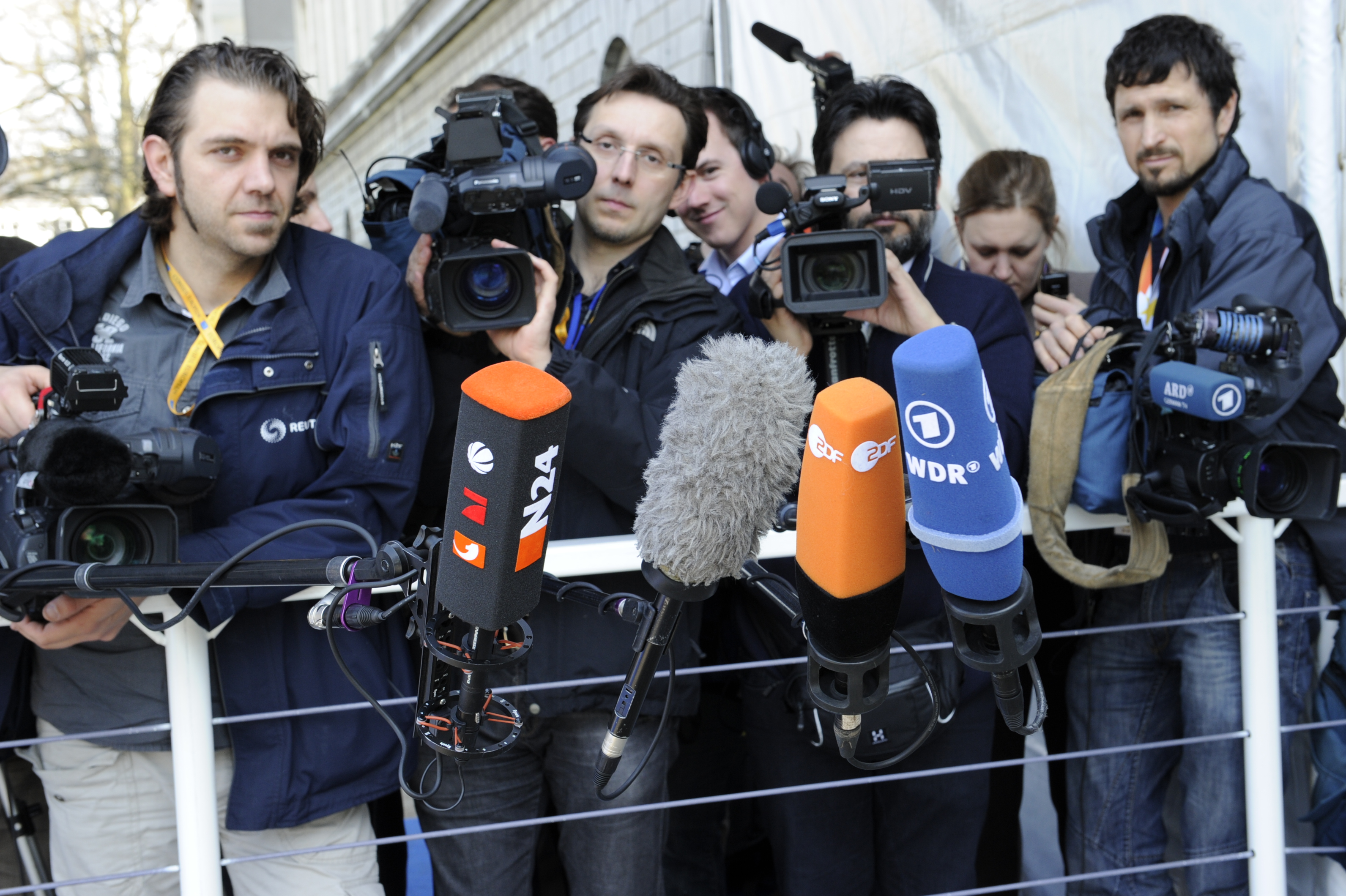 EPP Summit March 2010